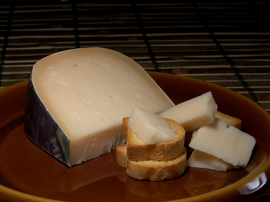 Midnight Moon Gouda Cheese